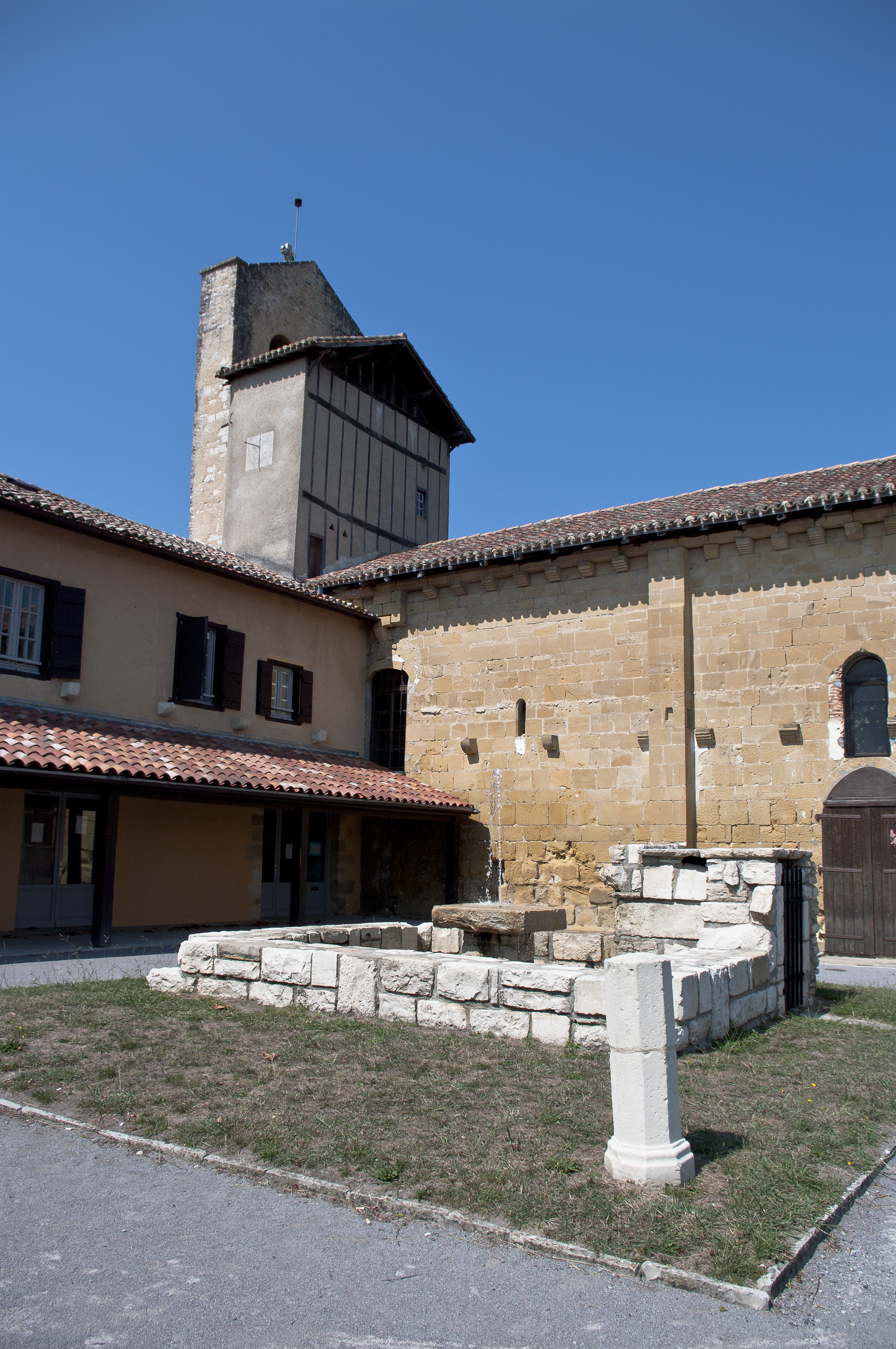 L'église Notre-Dame est un lieu de culte catholique situé dans la commune de Lahonce, dans le département français des Pyrénées-Atlantiques. .